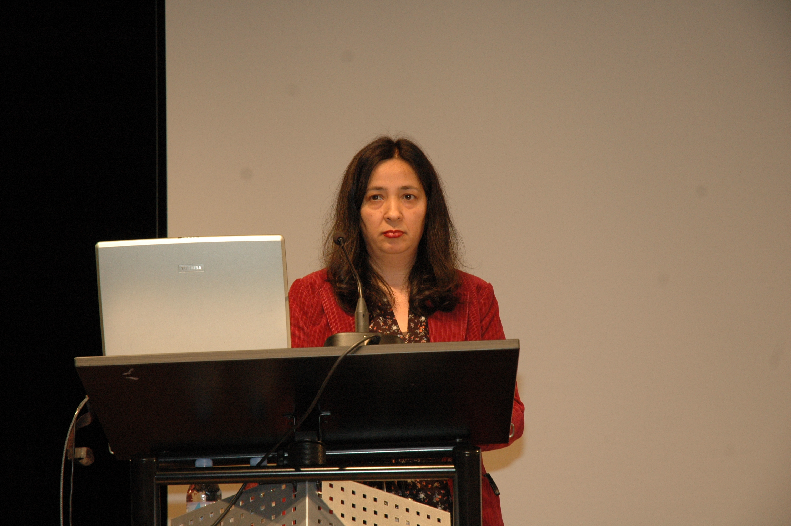 Seyran Ateş beim Kongress "Wert Urteile - Judging Values" in Karlsruhe am 11. Mai 2007